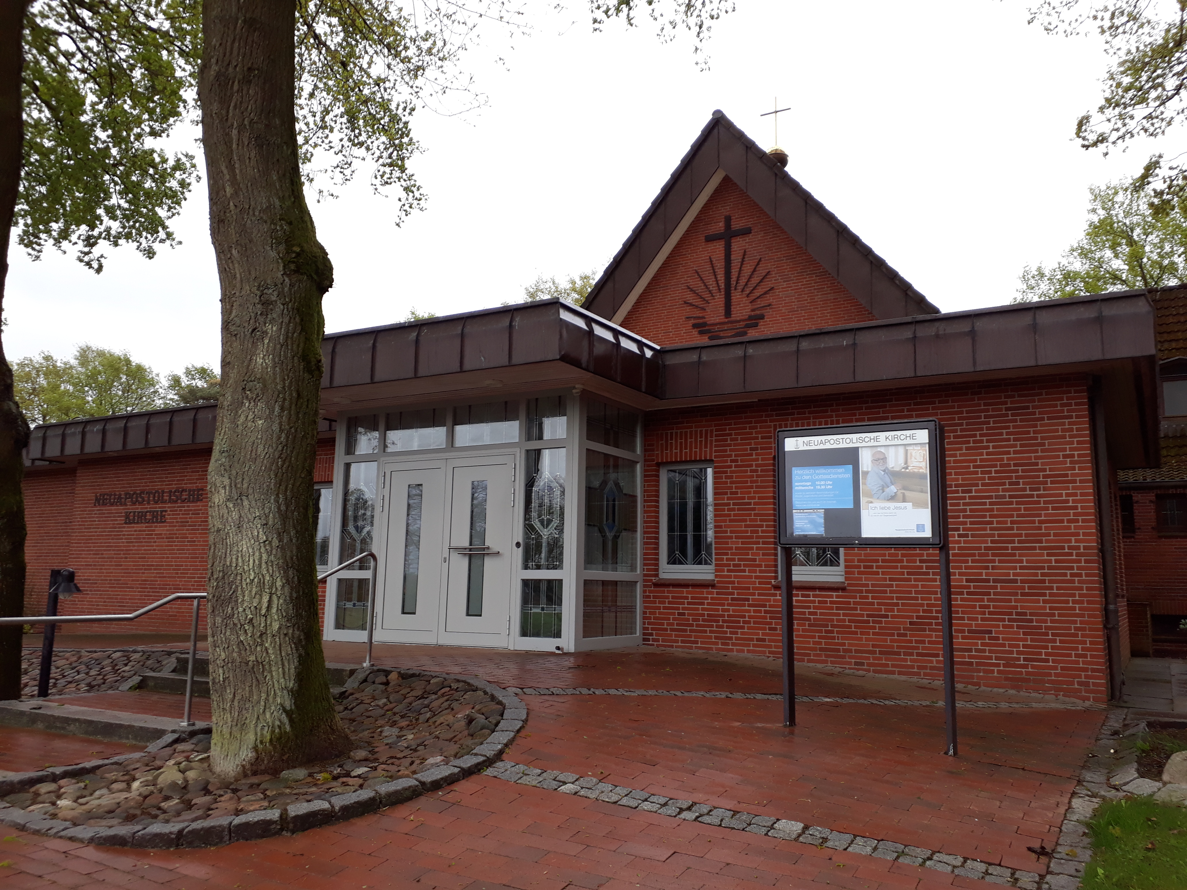 Neuapostolische Kirche in Kakerbeck-Doosthof, Ahlerstedt, Kreis Stade (Nds.)